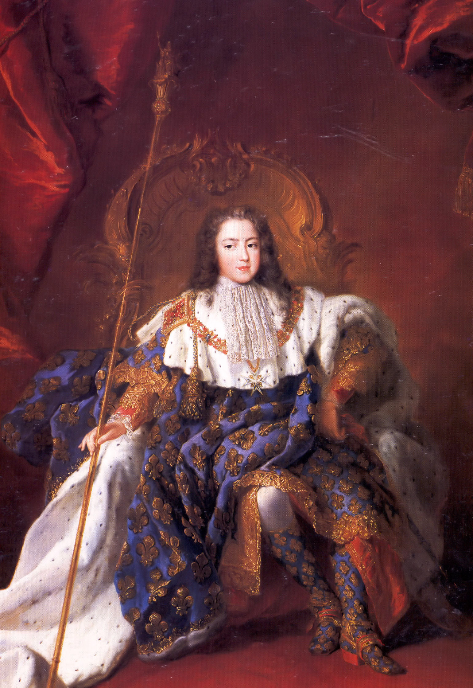 Subject: Sa Majesté le Roi Louis XV de France ; adolescent